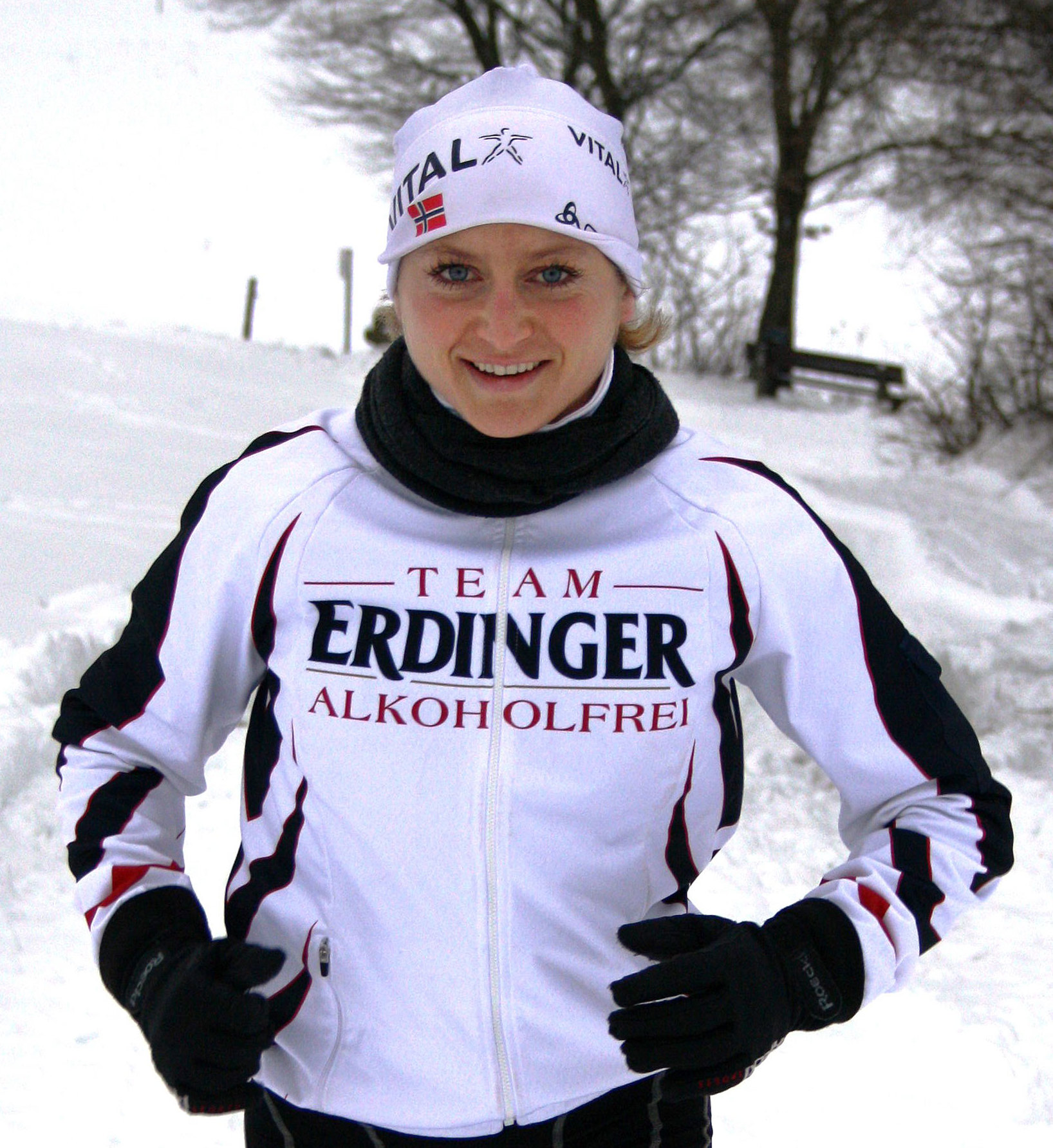 Celia Kuch – beim Lauftraining im Odenwald (Januar 2011)